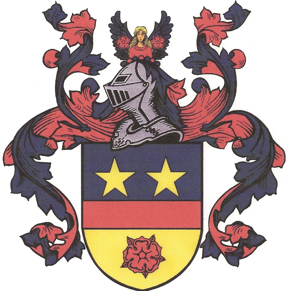 Stoessner arms